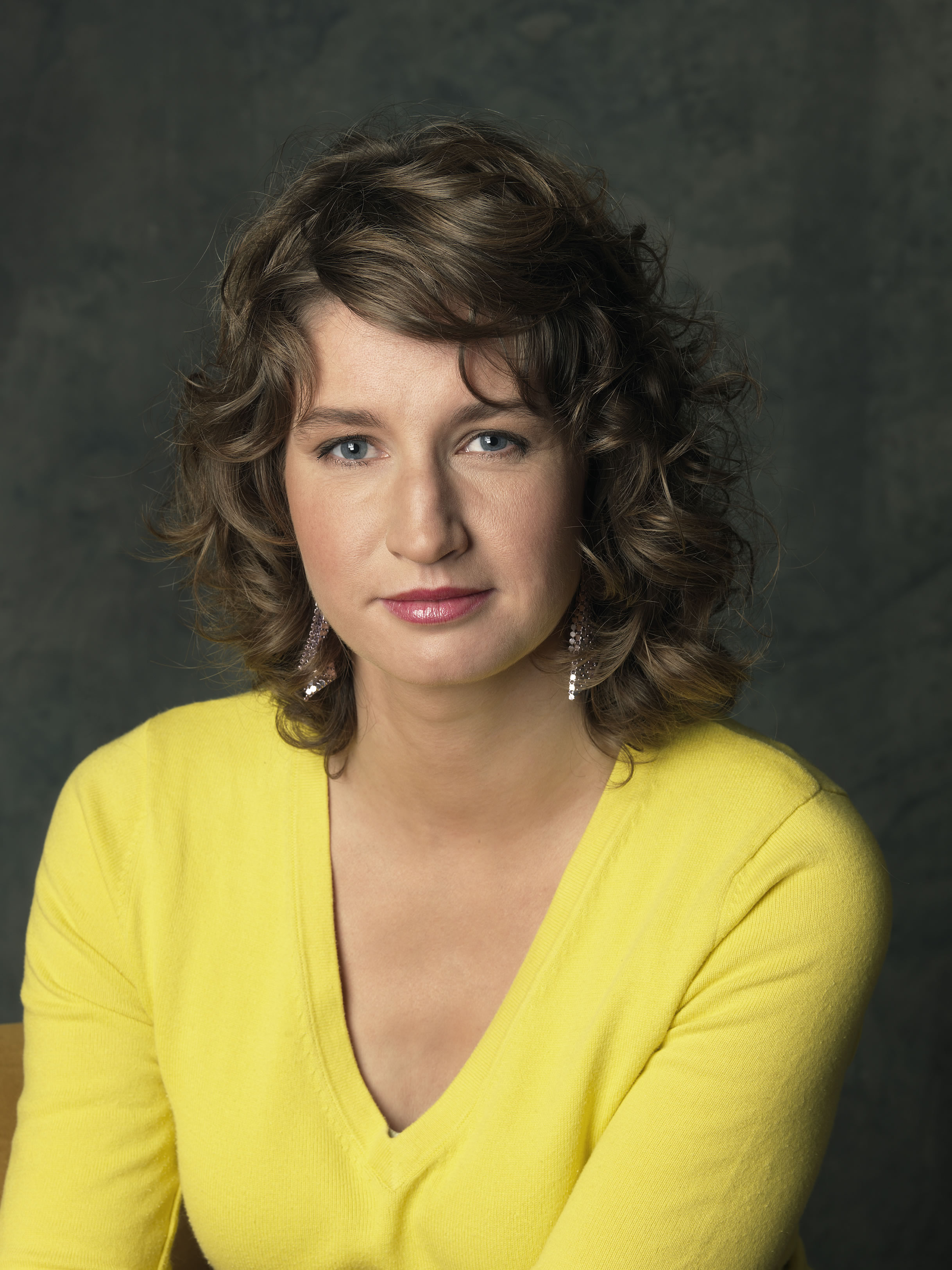 Sharon_Gesthuizen